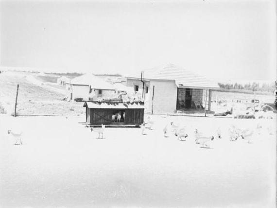 מושב שדה ורבורג משק עופות 1938 אוסף זולטן קלוגר גנזך המדינה